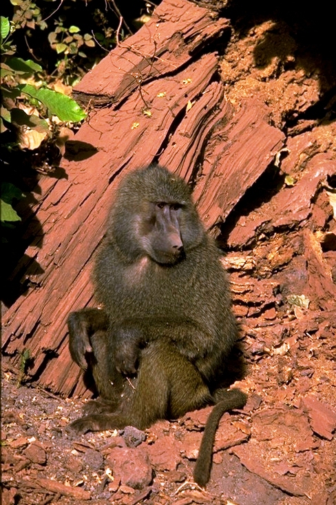 Baboon - Lake Manyara National Park - Tanzania